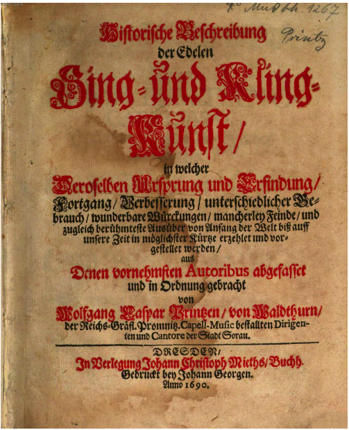 Page de titre de Historische Beschreibung der edelen Sing (1690) de Wolfgang Caspar Printz (Münchener Digitalisierungszentrum).